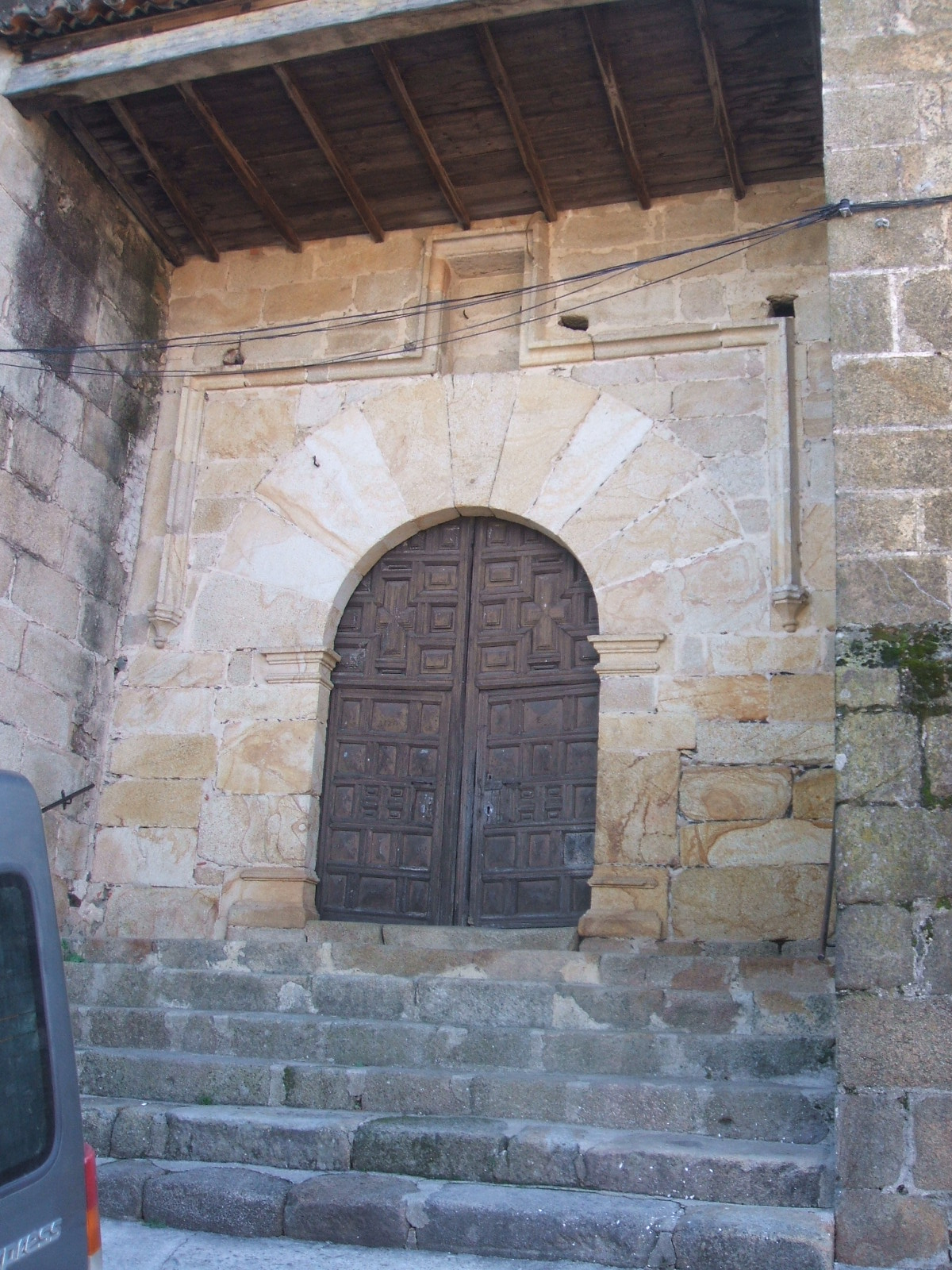 Villanueva de la Sierra